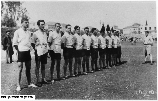 אימוני ג`יו ג`יצו של ההגנה במסווה של אימון הפועל בירושלים, 1931. המדריך - אברהם משורר